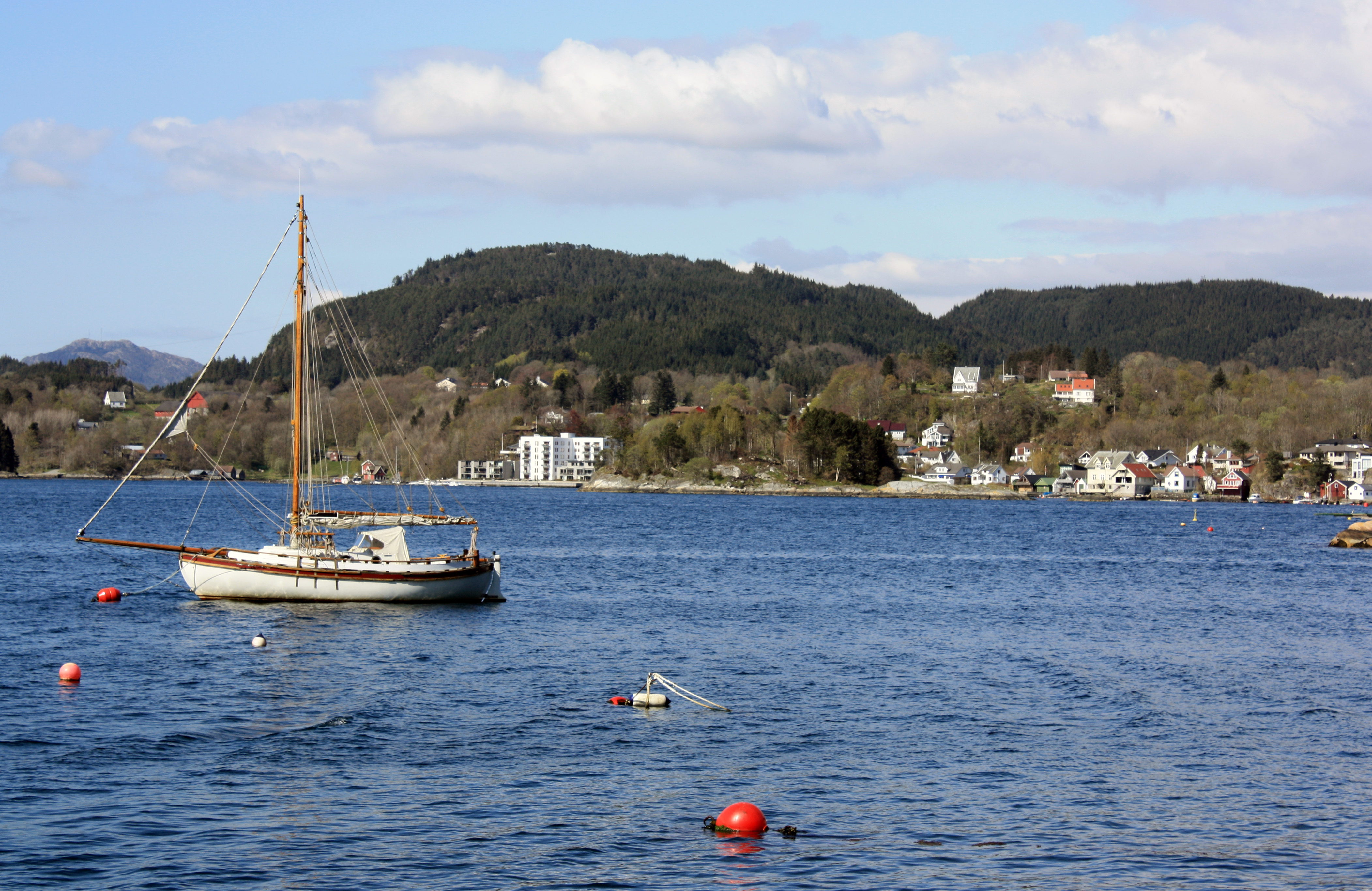 Fanafjorden towards Fanahammaren, Fana, Bergen.